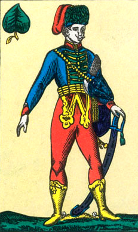 Német kártya zöld felső kártyalapja. A győri kártyafestő Unger Mátyásnak a kártyái különös keresetnek örvendtek. A Nemzeti Múzeum több csomagot őriz belőlük, e fametszetű lapokon a mester jelzése magyar nyelven is előfordul :»Unger Mátyás Győrben«,»Unger Győrben«, a német jelzés mellette pl.»fabricirt von Mathias Unger in Raab«. Ugyancsak itt láthatjuk egy próbalevonatát is ; egy nagy papírlapon egymás mellé van lehúzva a 32 db svájci kártyalap, mely más, mint reklámlap, nem lehetett.